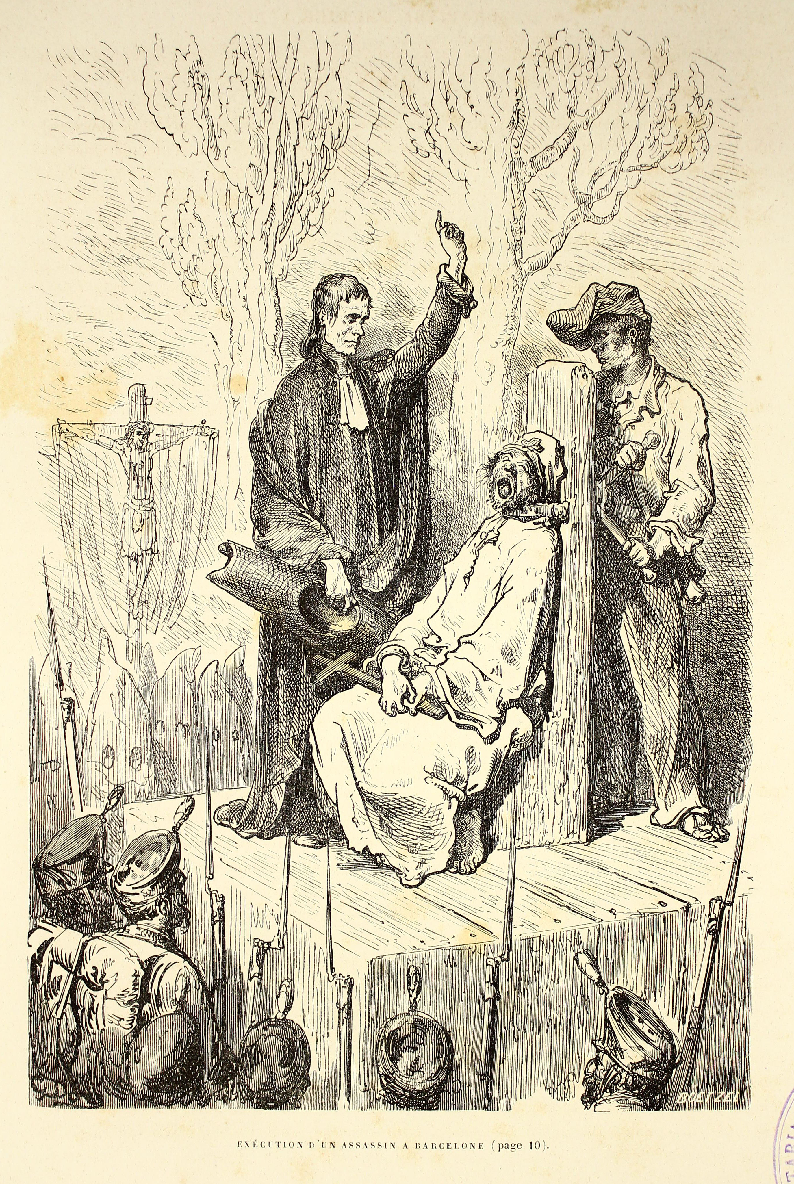 Autor: Davillier, Jean Charles, barón, 1823-1883 Descripción bibliográfica: L'Espagne / par Le Baron CH. Davillier ; ilustrée de 309 gravures dessinées su bois par Gustave Doré. - Paris : Librairie Hachette, 1874. - 799 p. : il. Materia: España- Geografía Materia: España- Usos y costumbres Ilustrador: Doré, Gustave, 1832-1883 Editor: Libreria Hachette Lugar de impresión: Francia, París Localización: Libro completo